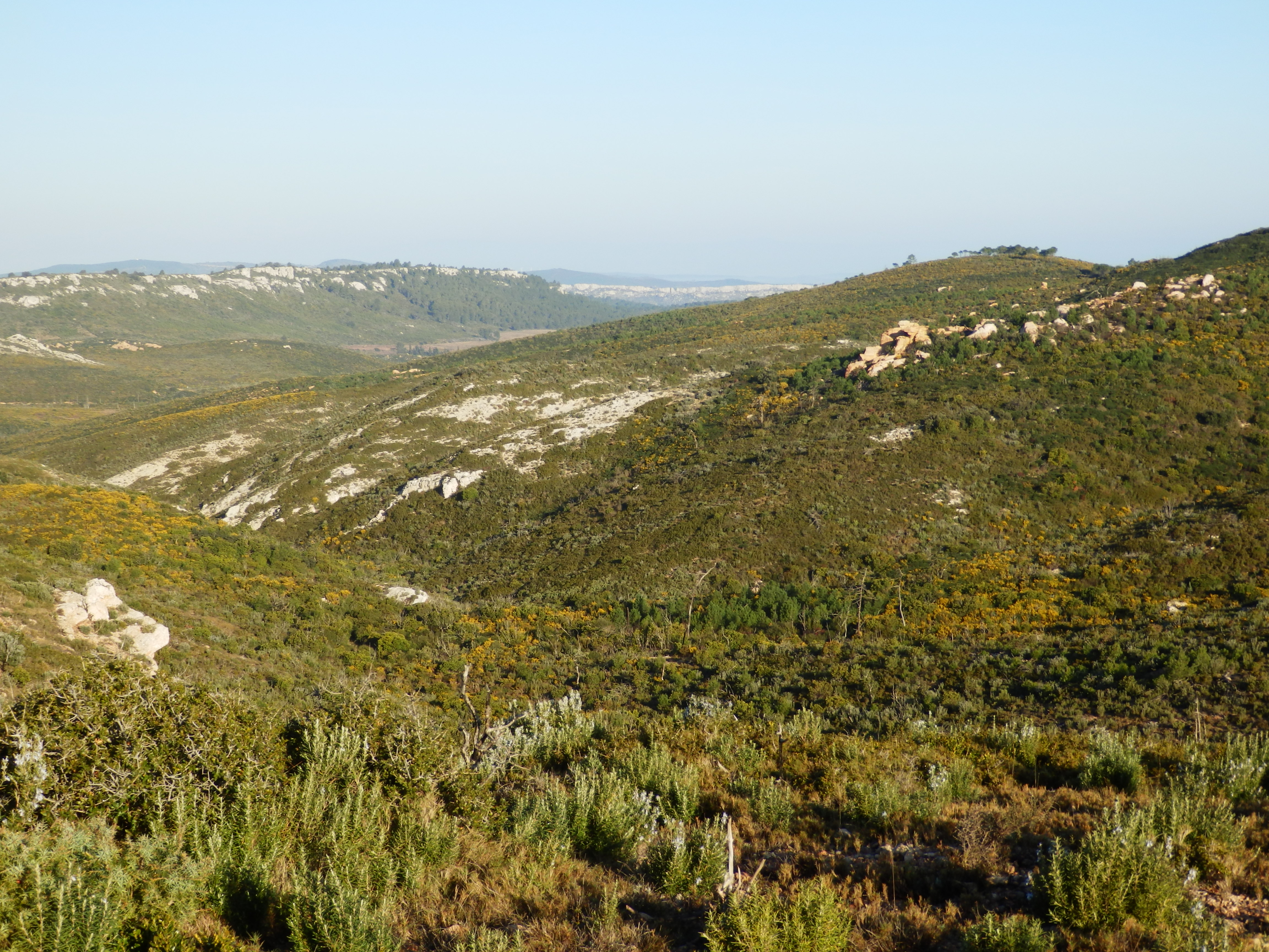 Massif de Fontrfoide